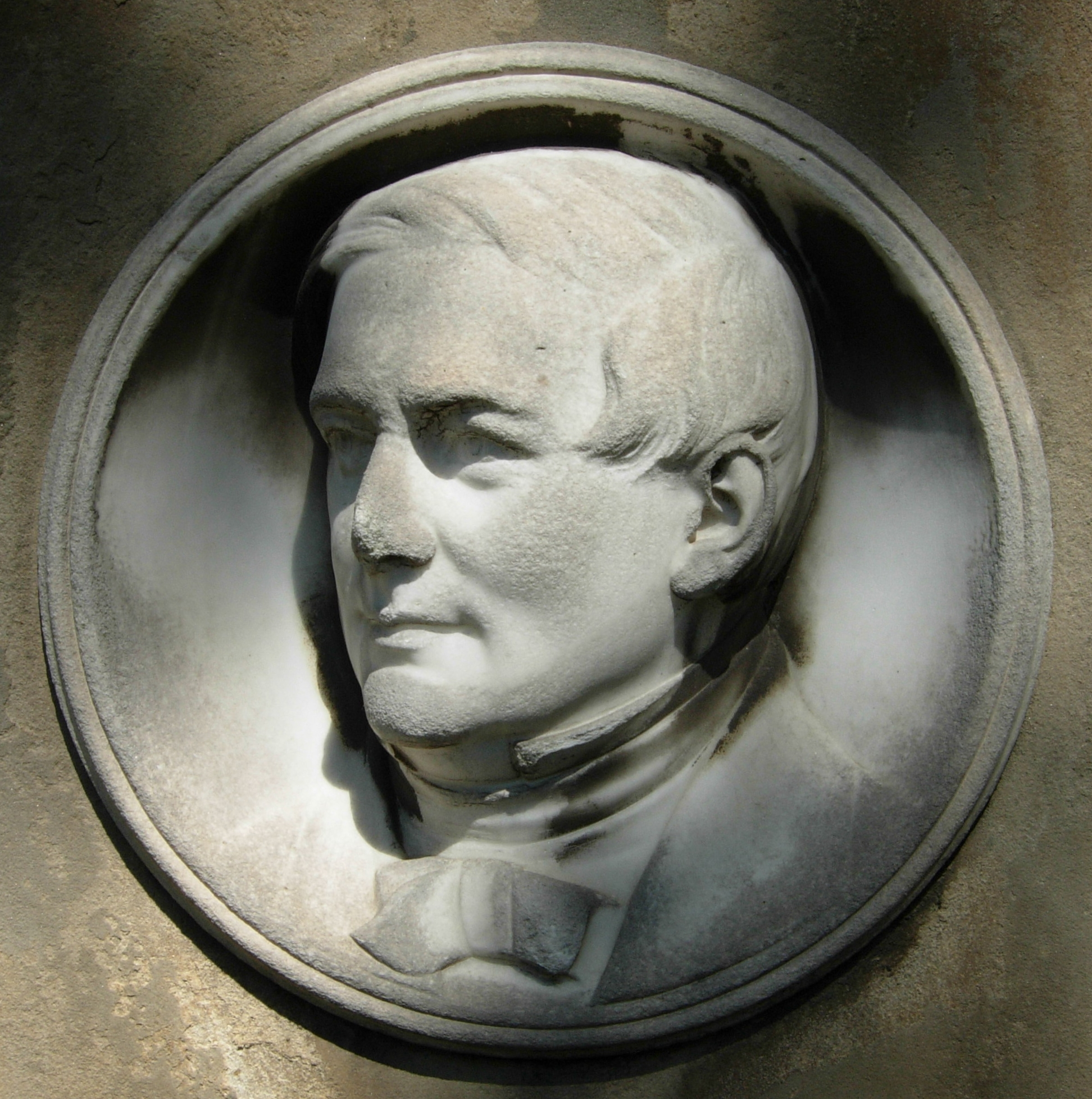 Albert Küppers: Marmor-Medaillon für den Musikdirektor Heinrich Carl Breidenstein (* 28. Februar 1796 in Steinau, † 12. Juli 1876 in Bonn) auf dem Alten Friedhof Bonn; Breidenstein studierte Jura in Berlin und Philologie in Heidelberg, dort begann er (unter dem Einfluss des Juristen und Musikliebhabers Thibaut), sich mit Musiktheorie zu beschäftigen; er zog 1823 nach Bonn und wurde zum Universitätsmusikdirektor, später zum Professor der Musik ernannt (er hatte sich bereits als Theoretiker, Kritiker und Komponist hervorgetan); Breidenstein war Präsident des Comités für Beethovens Monument; Quelle (zu Küppers): Aufsatz des Bonner Stadtbaurats von Noël: Der Friedhof vor dem Sterntore in Bonn in den Rheinischen Geschichtsblättern (8. Jahrgang, Nr. 10, Bonn 1907); Quelle (zu Breidenstein): Allgemeine Deutsche Biographie; Schriften Breidensteins: a) Erinnerung an Ludwig Van Beethoven und die Feier der Enthüllung seines Monuments zu Bonn am 10., 11. und 12. August 1845, Verlag B. Plenes, Bonn 1845, b) Zur Jahresfeier der Inauguration des Beethoven-Monuments, eine aktenmäßige Darstellung dieses Ereignisses, der Wahrheit zur Ehre und den Festgenossen zur Erinnerung, Bonn 1846